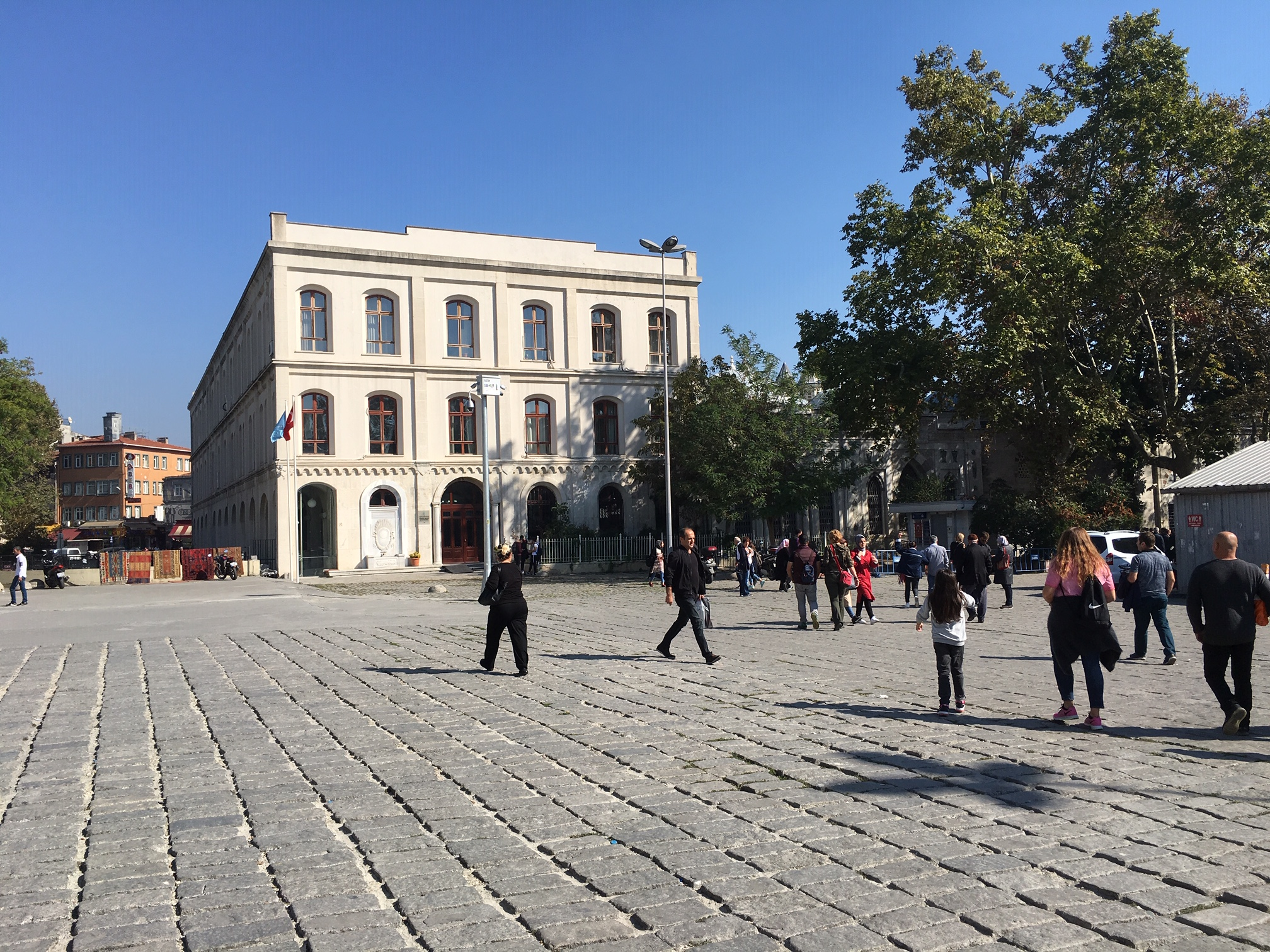 1964 yılında İstanbul Üniversitesi Diş Hekimliği Fakültesi Binası: Günümüzde Kütüphane olarak kullanılmaktadır.